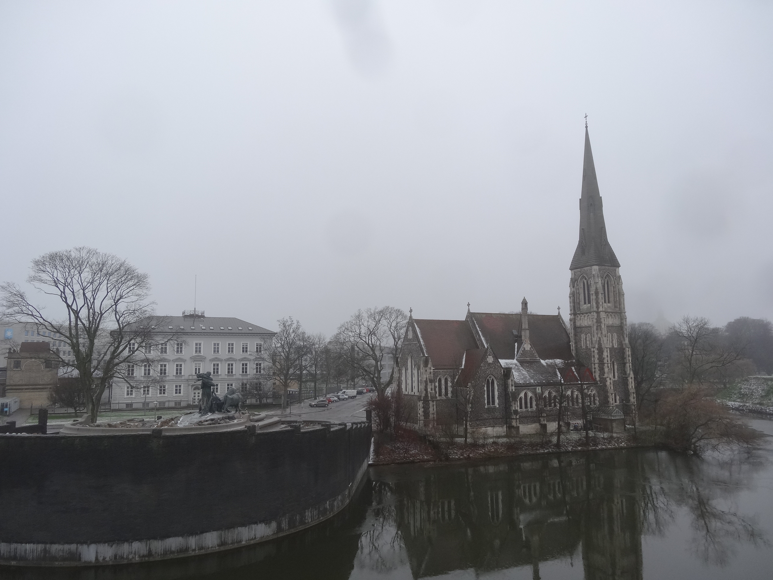 Copenhague/København (desembre 2013)